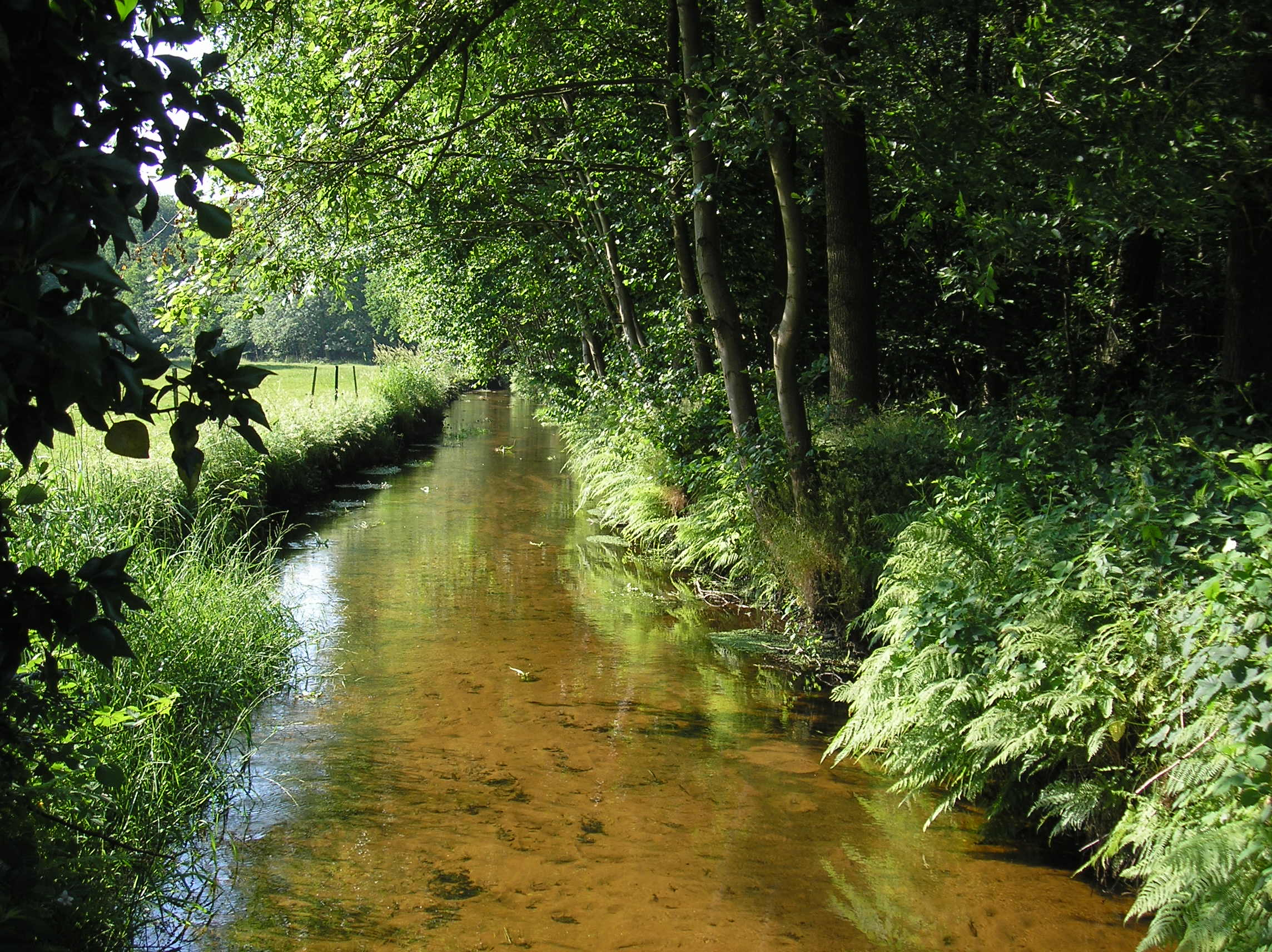 Foto van de Leuvenumse beek ter hoogte van de Zwolsebrug op Oude Zwolseweg te Leuvenum. Foto is gemaakt door CdZ. De foto is gemaakt op 17 juni 2006. Eigen werk. De foto is vrijgegeven onder GFDL.